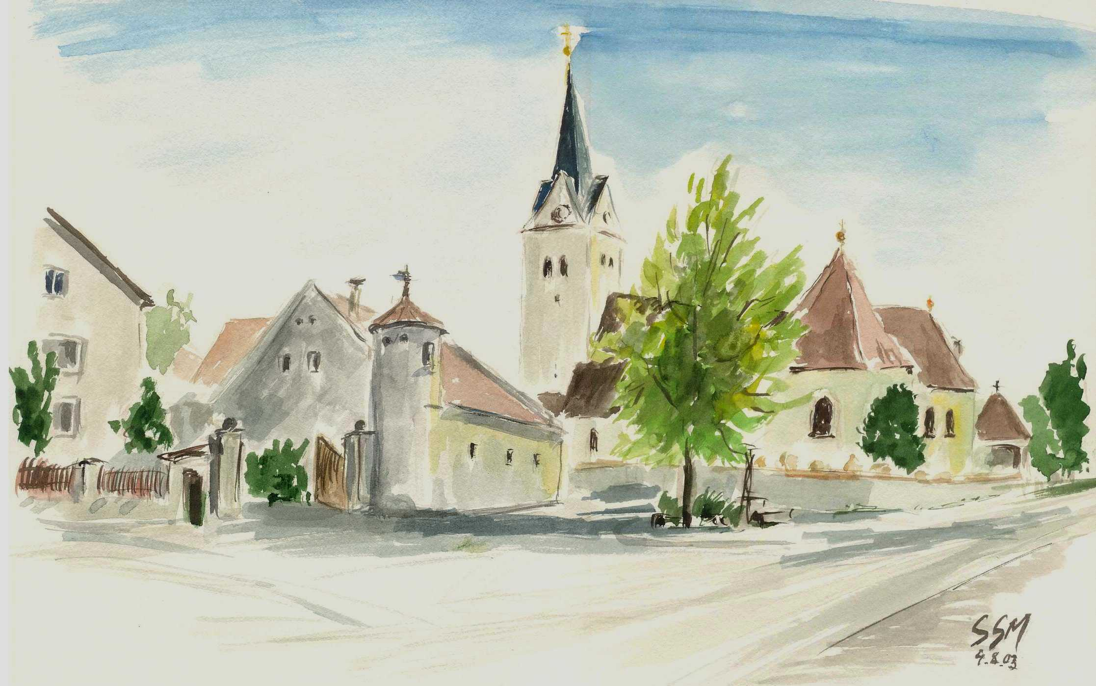 Tauberfeld im Landkreis Eichstätt, Dorfmitte mit Kirche. Aquarell von Siegfried Schieweck-Mauk, Eichstätt, Werk-Verz. 999